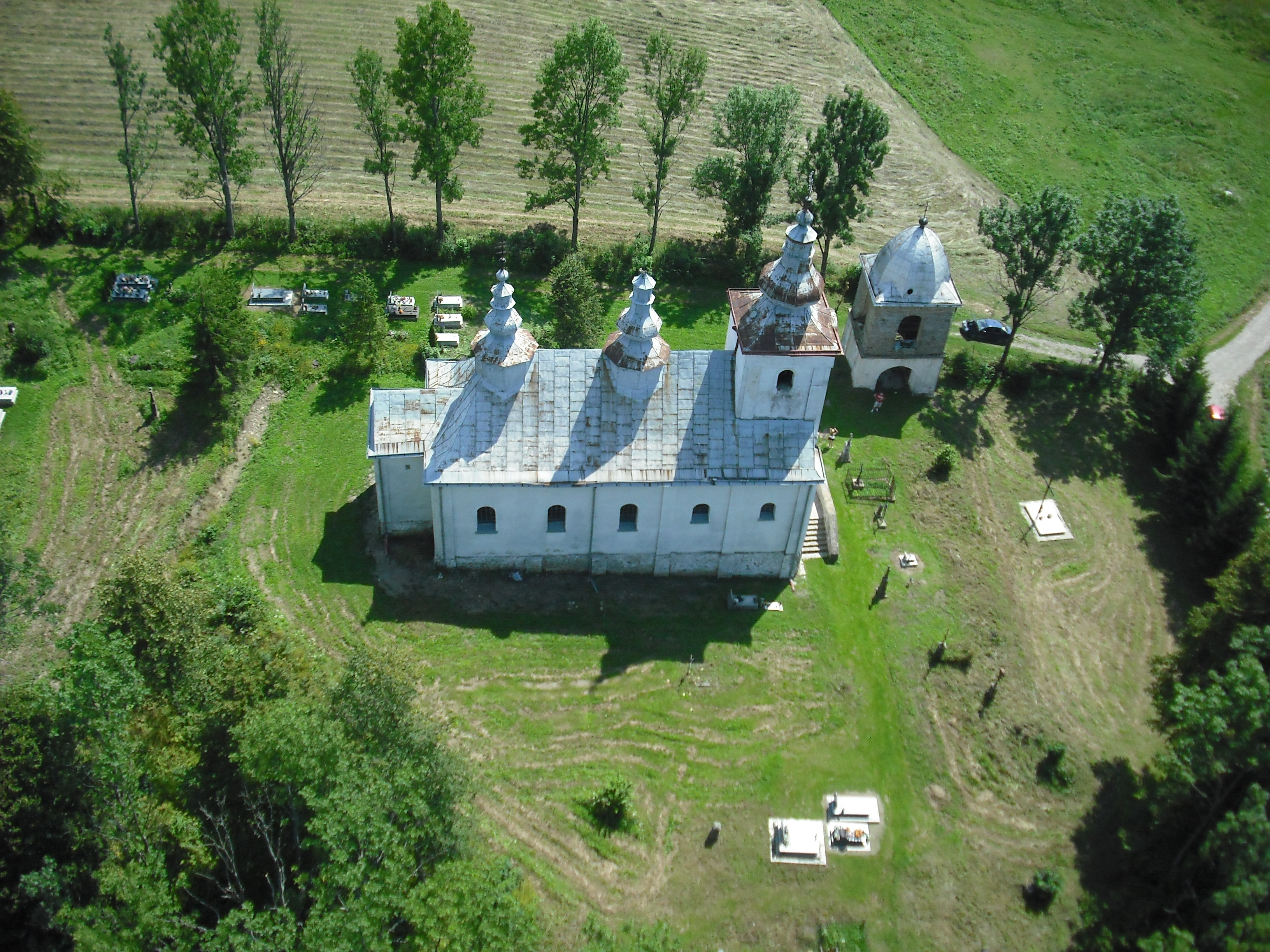 zespół cerkwi gr.-kat. p.w. św. Mikołaja, ob. kościół rzym.-kat. cerkiew gr.-kat. p.w. św. Mikołaja, ob. kościół rzym.-kat. dzwonnica przy cerkwi gr.-kat p.w. św. Mikołaja. ob. kościele rzym.-kat. cmentarz przy cerkwi gr.-kat. ob. kościele rzym.-kat. Widok z lotu ptaka Smolnik, Komańcza 01.1995.